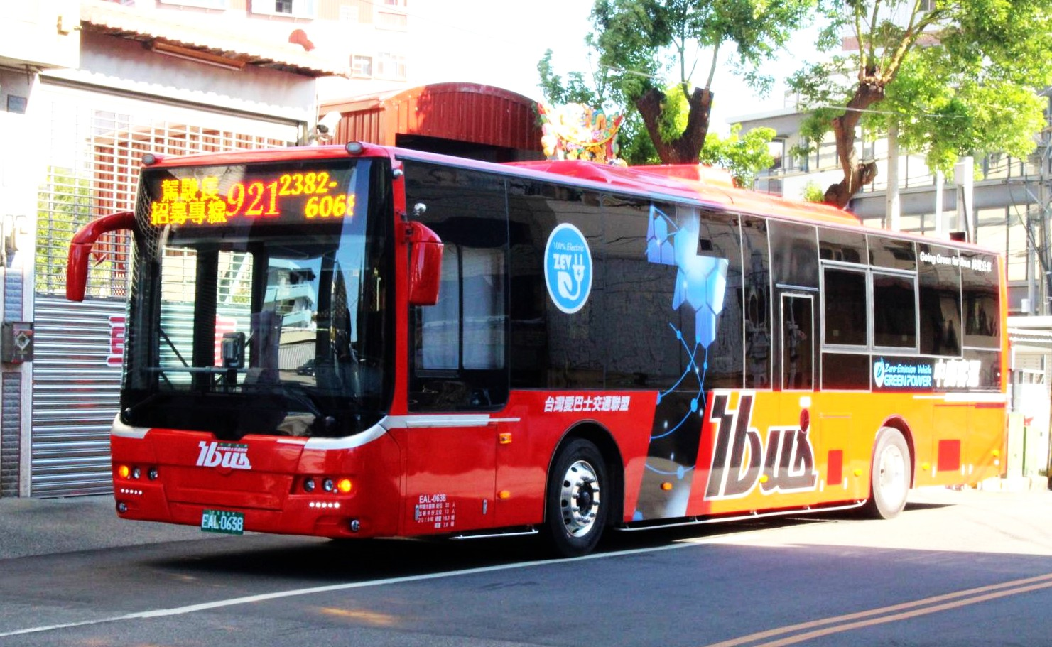 中鹿客運 GOLDEN DRAGON XML6125JEV EAL-0638